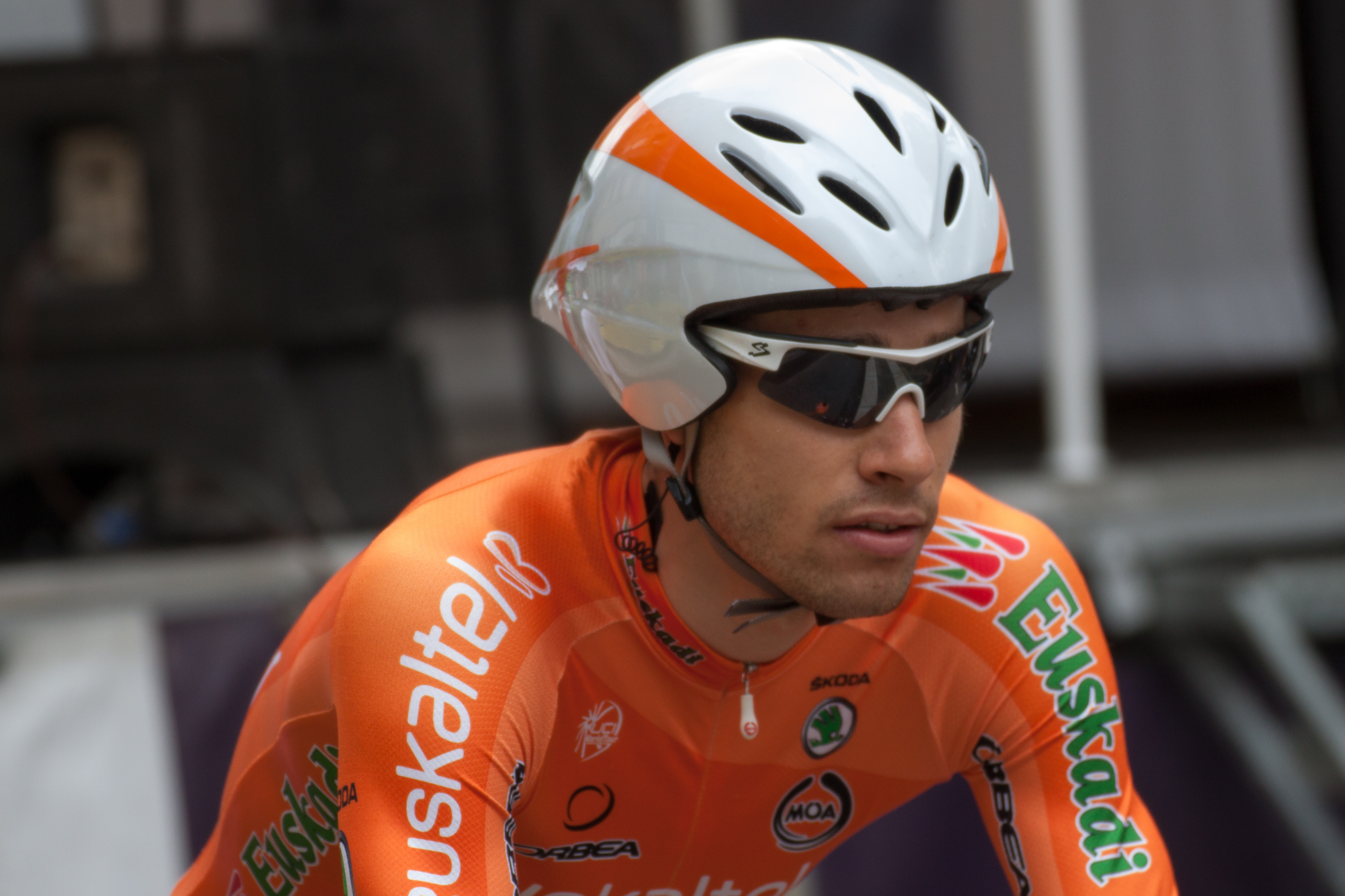 Ricardo García Ambroa lors du Prologue du Critérium du Dauphiné 2012